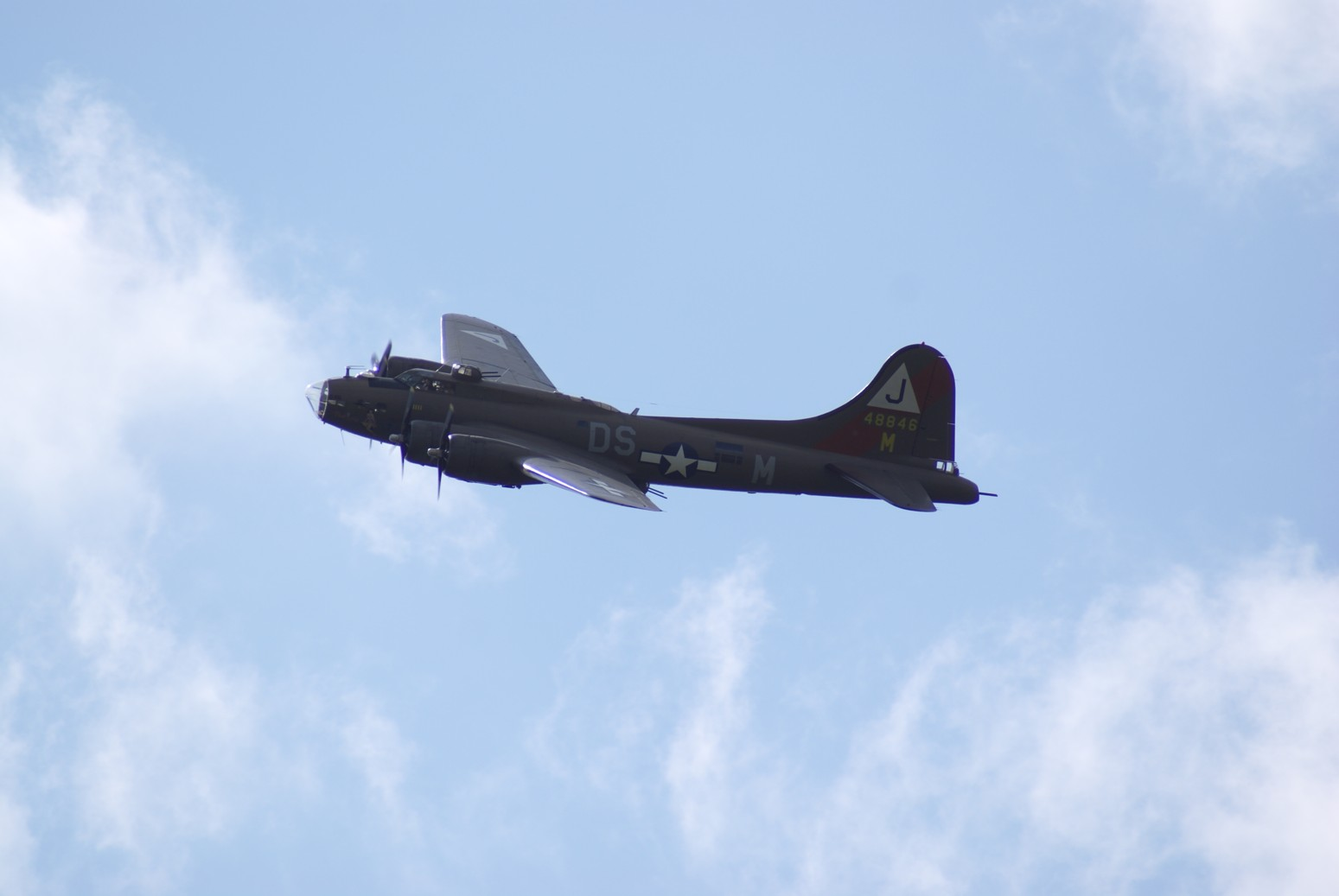 Boeing B-17 Flying Fortress "Pink Lady" (F-AZDX) beim 15. Oldtimer-Fliegertreffen auf der Hahnweide